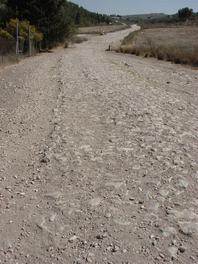 דרך סולינג בפארק רמות מנשה